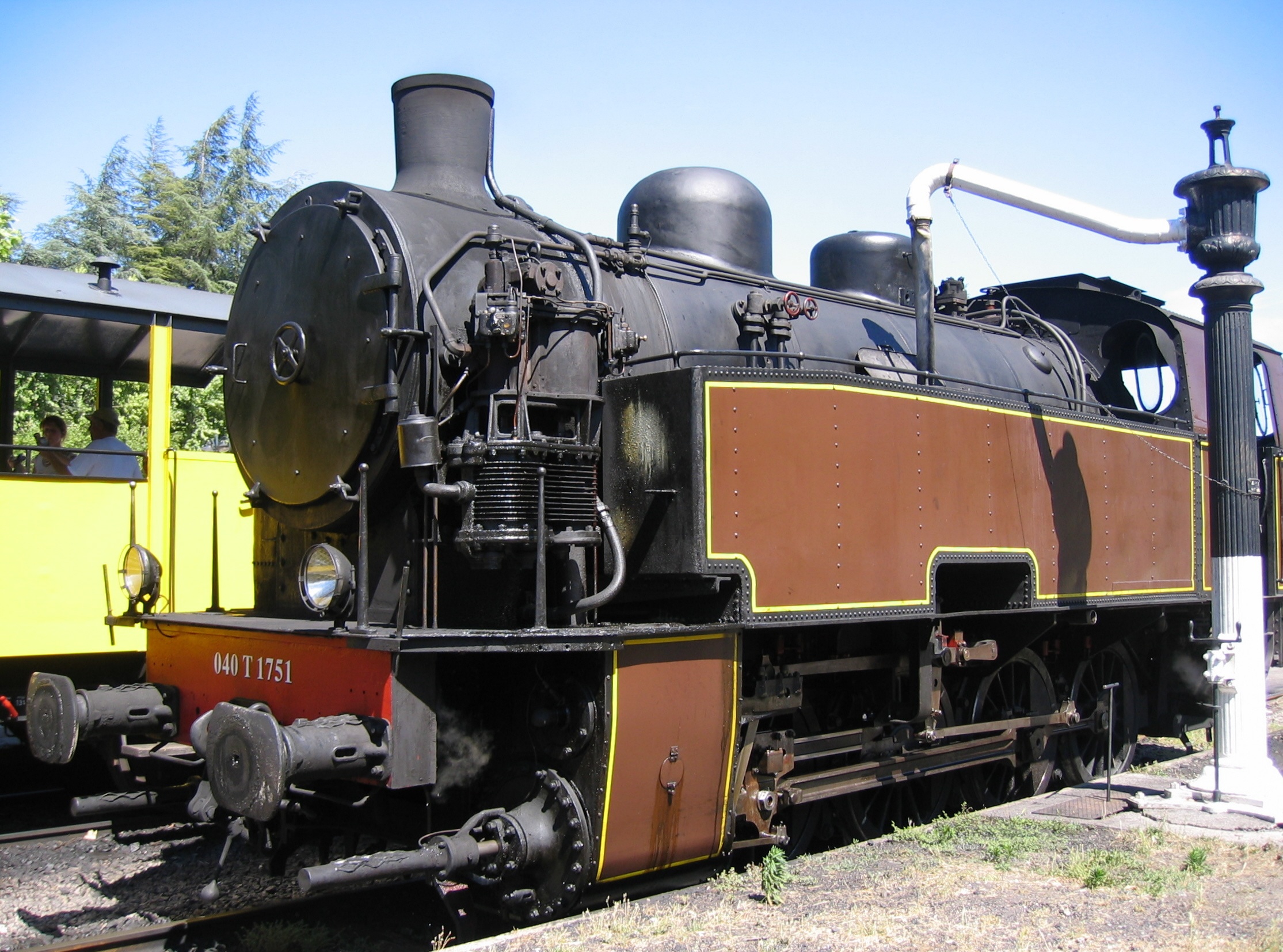 Train à vapeur des Cévennes reliant Anduze et Saint-Jean-du-Gard (France)